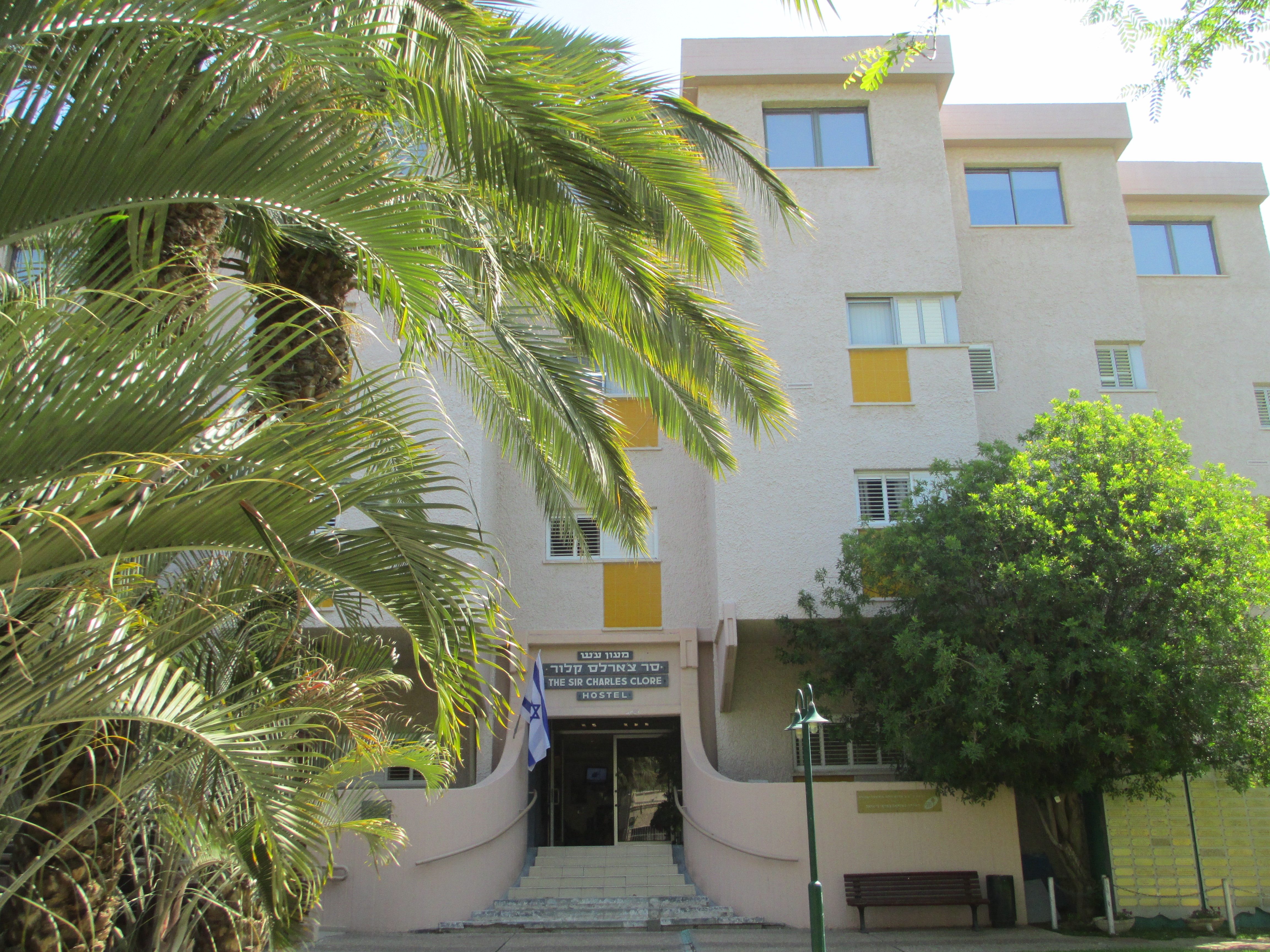 מעון ע"ש צ'ארלס קלור בגבעתיים